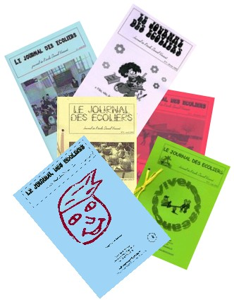 Journaux scolaires.